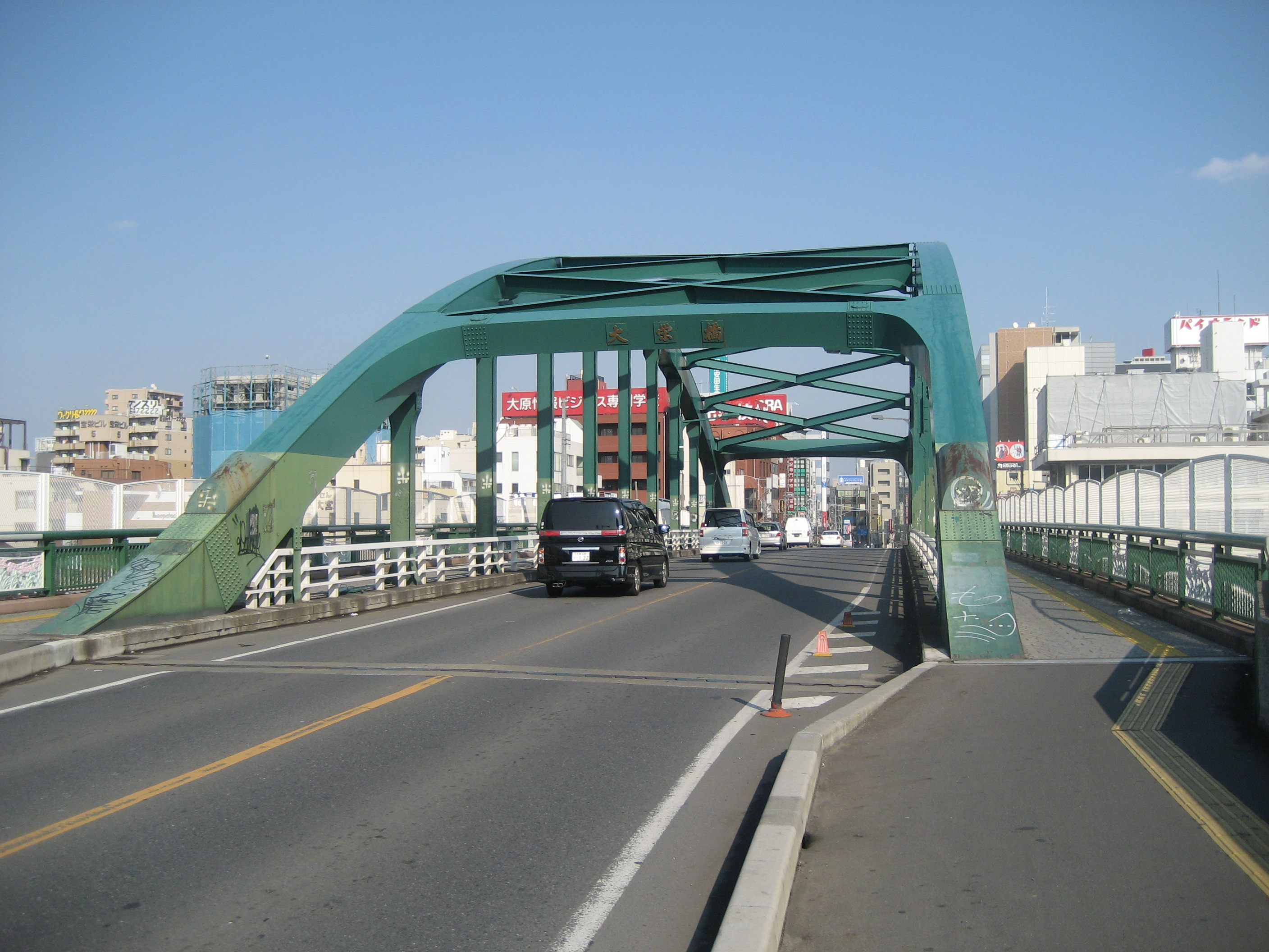 埼玉県道2号線大栄橋（さいたま市大宮区）岩槻方面側を撮影